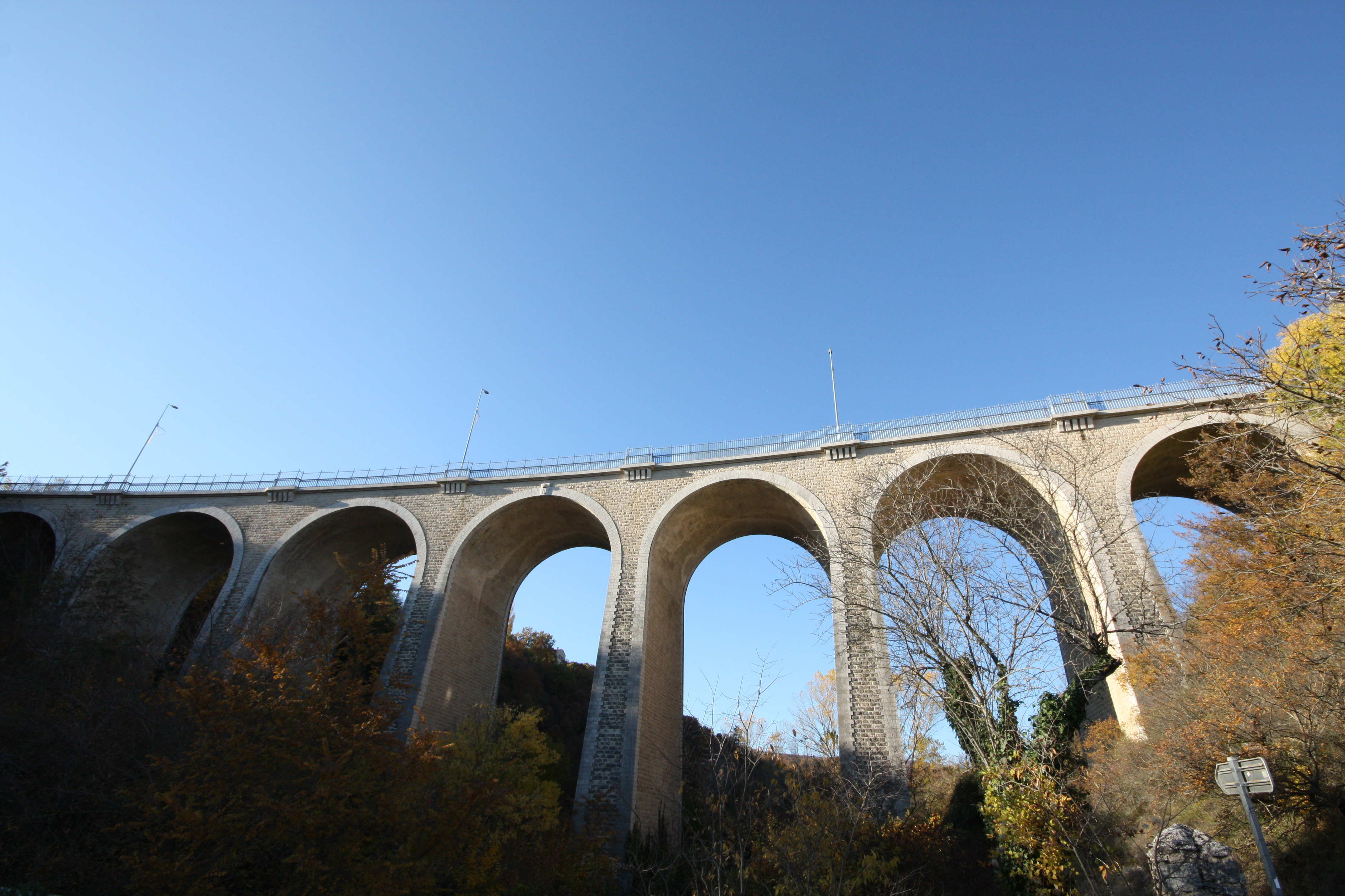 Viaduc du Viou (Forcalquier)